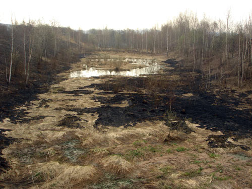 Новинки. Котлован — наследие химической промышленности.